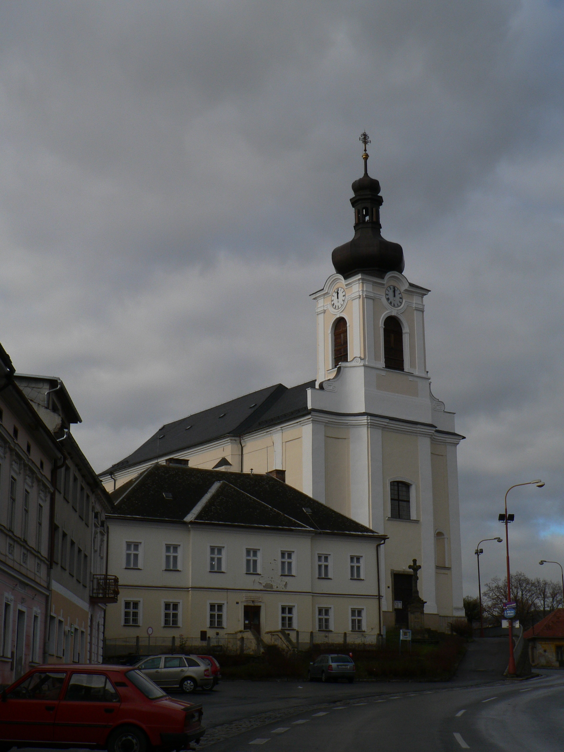 Kostel Nanebevzetí Panny Marie (Štíty)